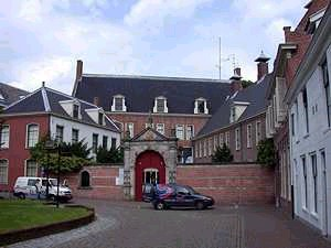 Zelf gemaakt, toestemming voor gebruik op Wikipedia